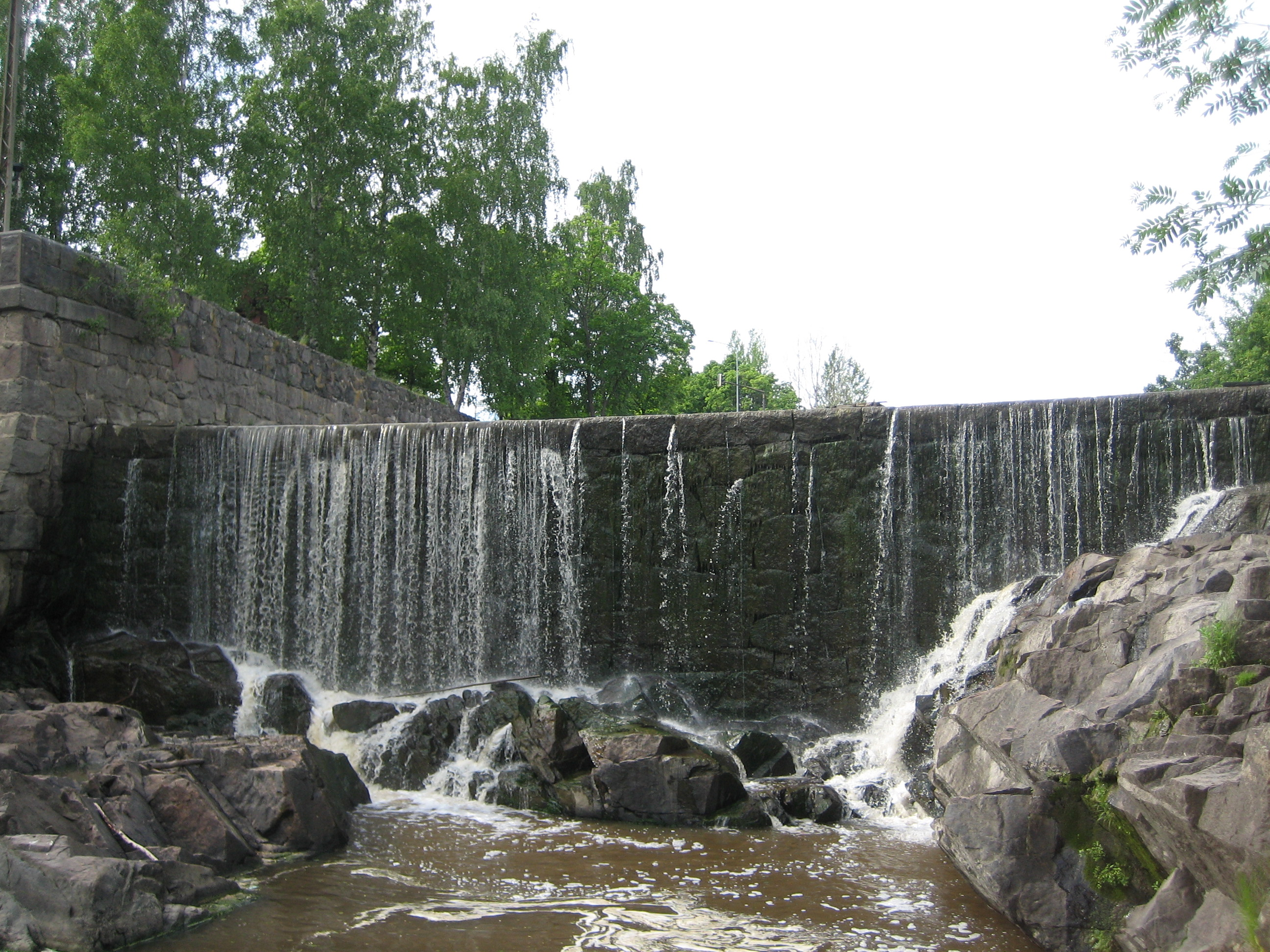 A dam in Vantaanjoki